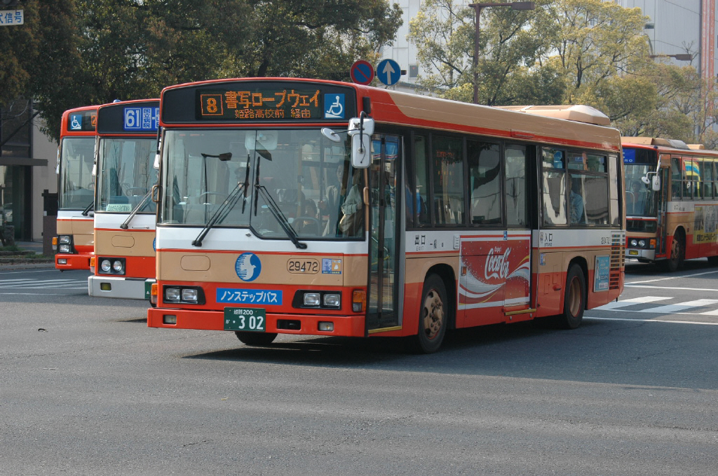 神姫バス移管後 姫路市内にて撮影